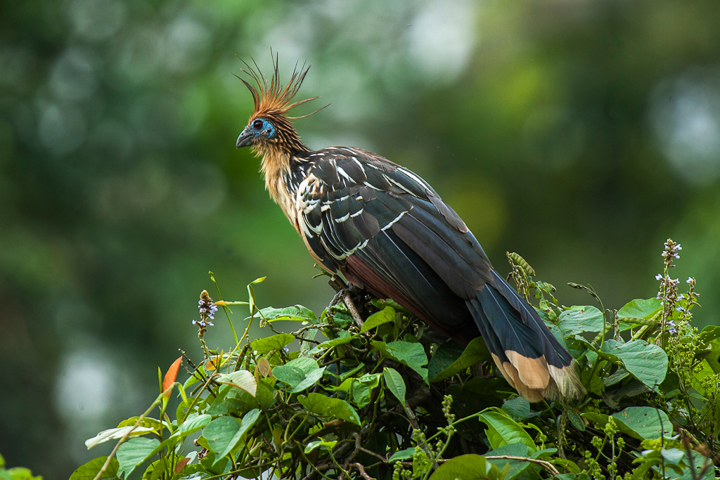 Hoatzin - Manu NP - Perù_9203